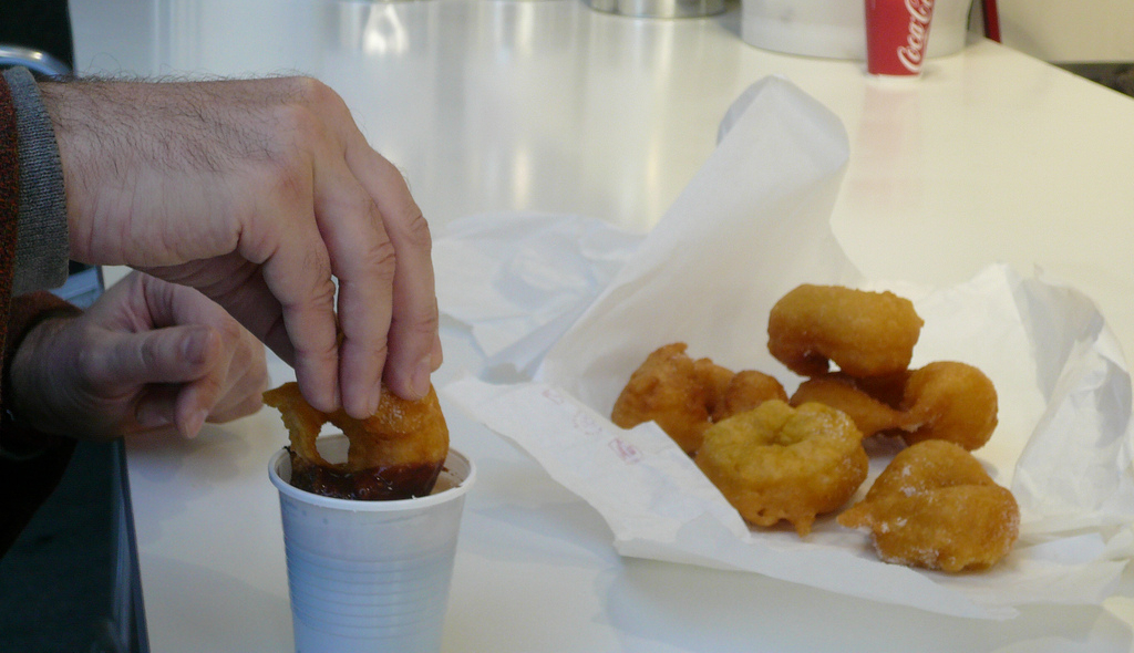 Bunyols de carabassa amb xocolate, a les Falles de Valencia